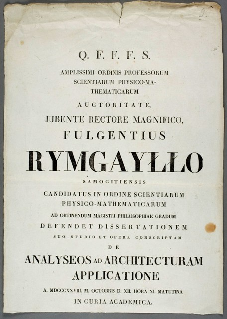 Skelbimas apie tai, kad žemaitis Fulgencijus Rimgaila 1828 m. spalio 12 d. Vilniaus universitete gins filosofijos magistro laipsnį.